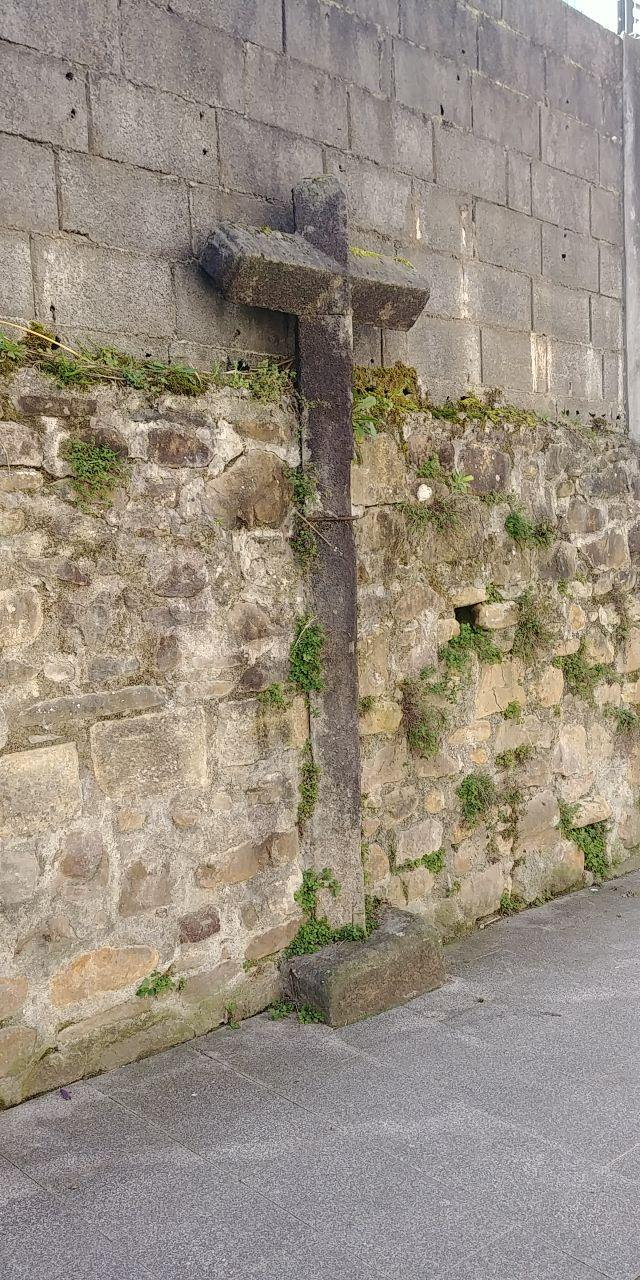 Antzuola, kalegoi, kalbarioko gurutzea